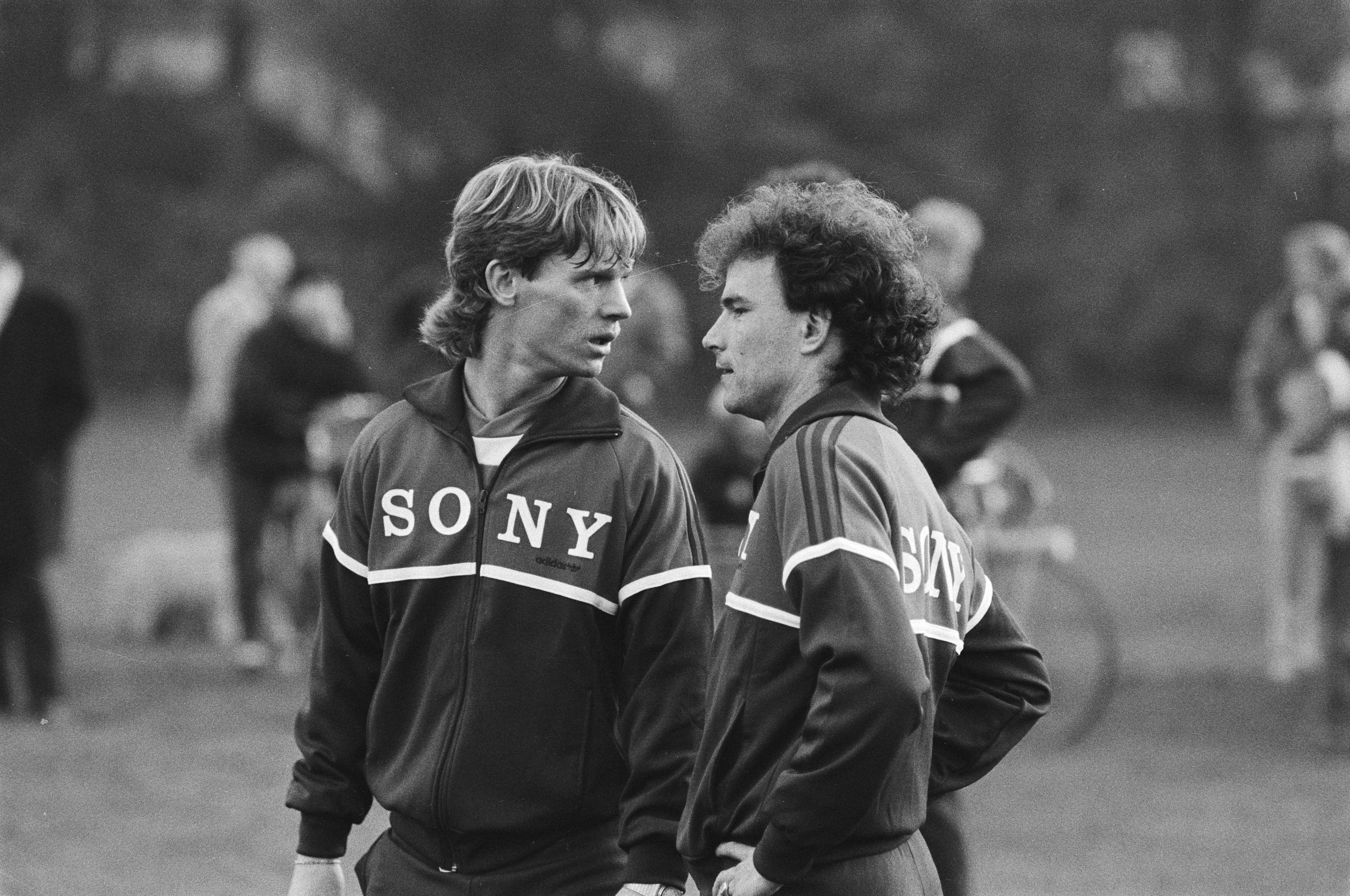 Collectie / Archief : Fotocollectie Anefo Reportage / Serie : [ onbekend ] Beschrijving : Het Nederlandse elftal trainde vandaag in het Olympisch Stadion in Amsterdam ivm interland tegen Oostenrijk Datum : 11 november 1984 Locatie : Amsterdam, Noord-Holland Trefwoorden : sport, trainingen, voetbal Persoonsnaam : Mario Been, Michel Valke Instellingsnaam : Olympisch Stadion Fotograaf : Bogaerts, Rob / Anefo Auteursrechthebbende : Nationaal Archief Materiaalsoort : Negatief (zwart/wit) Nummer archiefinventaris : bekijk toegang 2.24.01.05 Bestanddeelnummer : 933-1440